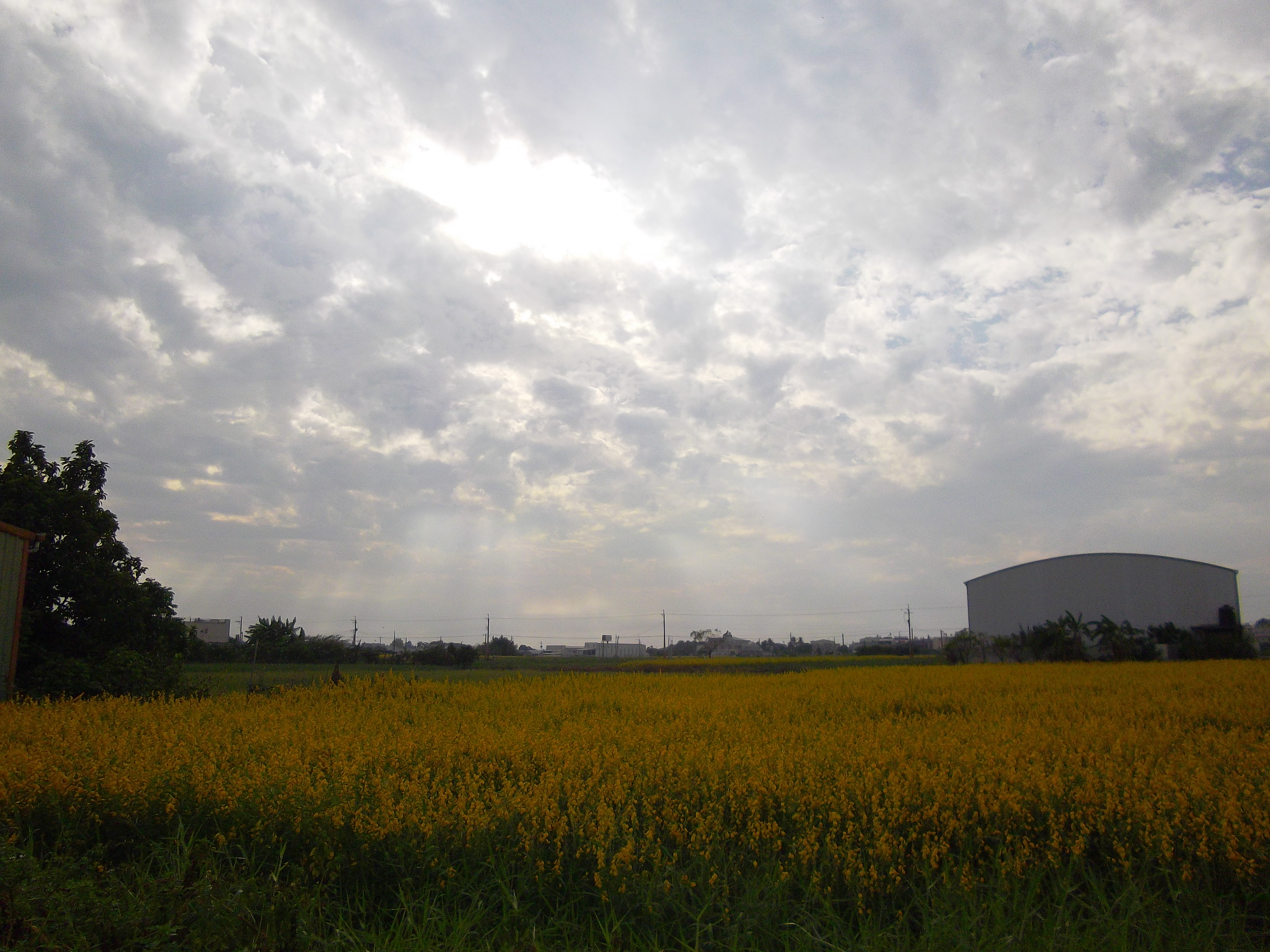 陽光從雲縫中探出